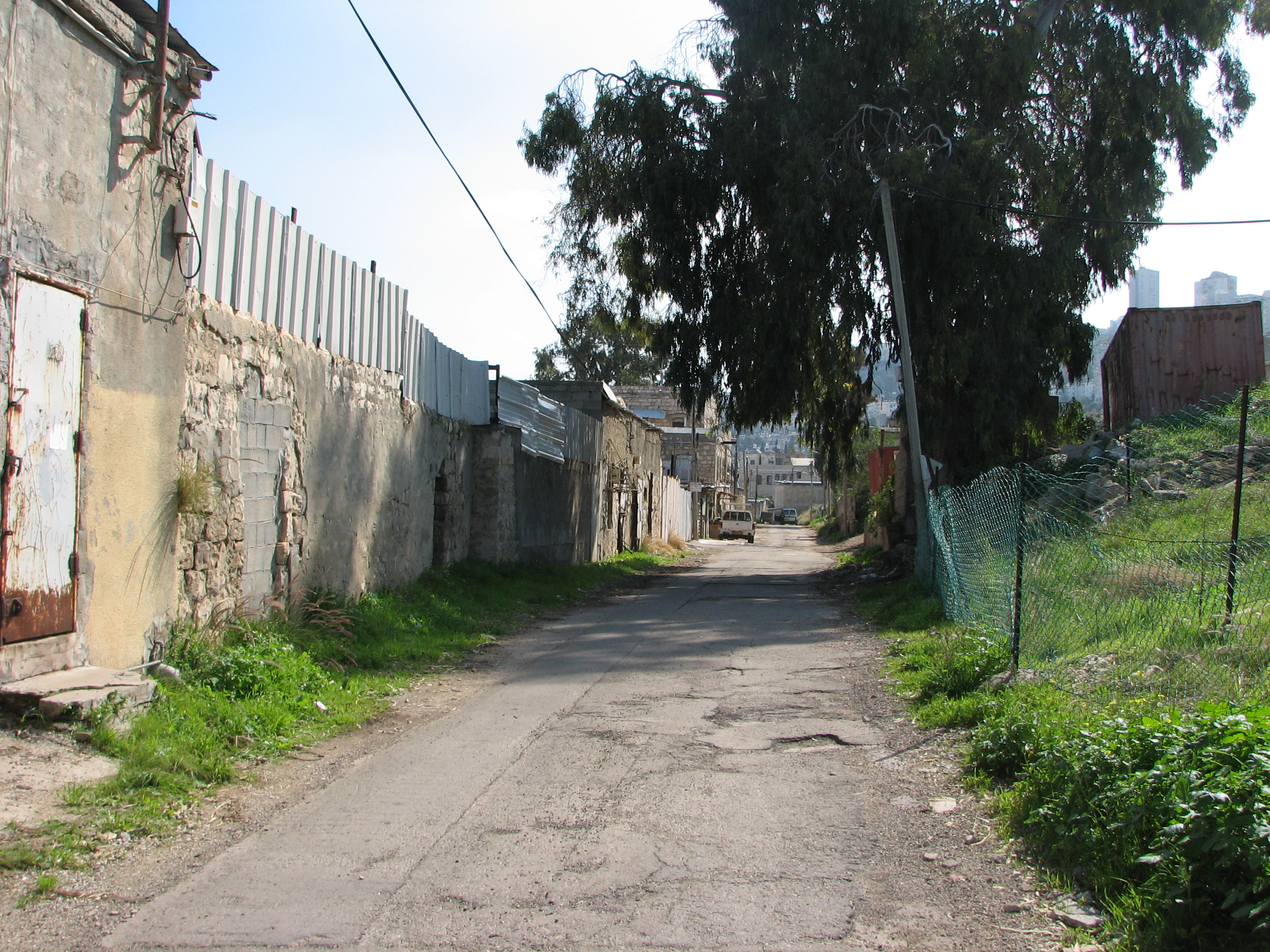 Ard el-Yahud, Haifa, Israel Was the first Jewish Neighbourhood out of the walls of Haifa. established on 1891 ארד אל-יהוד הייתה השכונה היהודית הראשונה שבנו יהודי חיפה מחוץ לחומות העיר שבנה דאהר אל-עומר השכונה נבנתה בשנת 1891 ליד ואדי רושמיה רחוב יהודה הלוי. מבט לכוון דרום מזרח. צידו הצפון מזרחי שרד. צידו הדרום מערבי נהרס